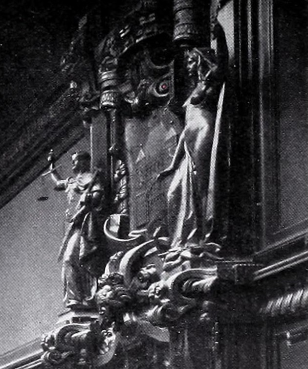 Figuren-Allegorie "Gerechtigkeit" (links) und "Wahrheit" (rechts) entworfen von Heinrich Günther-Gera. Angebracht über dem Rednerpult im Stadtverordneten-Sitzungssaal im dritten Rathaus von Charlottenburg, eingeweiht 1905. Der Saal brannte während des 2. Weltkriegs vollkommen aus. Reproduktionen dieser Statuen erschuf Schwan Kamal im Jahr 2010. Sie wurden als Portalfiguren am Rathaus Wuppertal-Elberfeld angebracht. Dort standen bis 1943 züchtiger bekleidete Figuren "Gerechtigkeit" und "Wahrheit" von H. Günther-Gera. Der Künstler wurde auf Grund der Arbeit im Rathaus von Charlottenburg nach Elberfeld geholt.